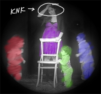 9 לשבת תיאטרון מראה 2009 (בתמונה מורן מרואני ושלושת ילדיה)